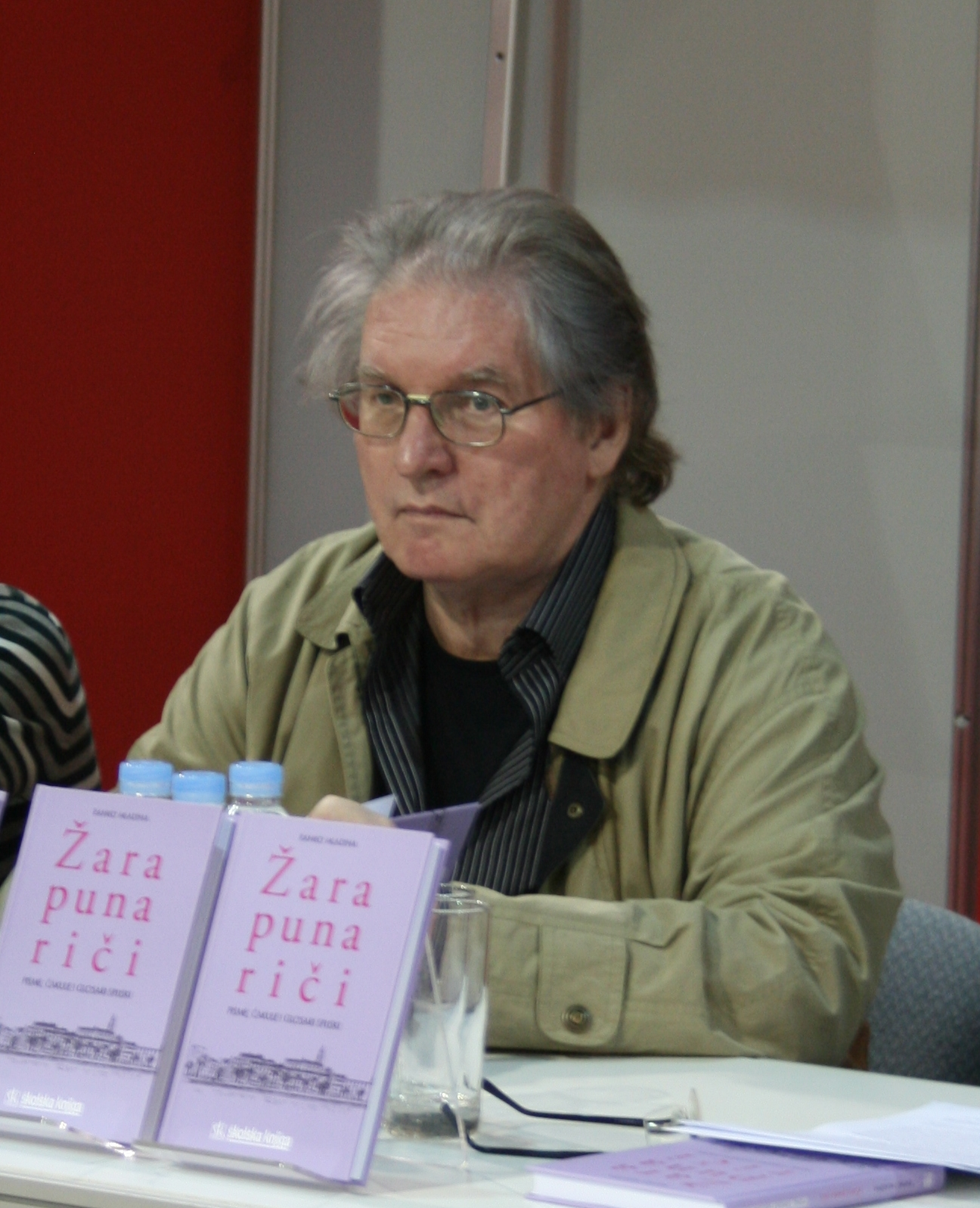 Igor Mandić na Interliberu 2008.